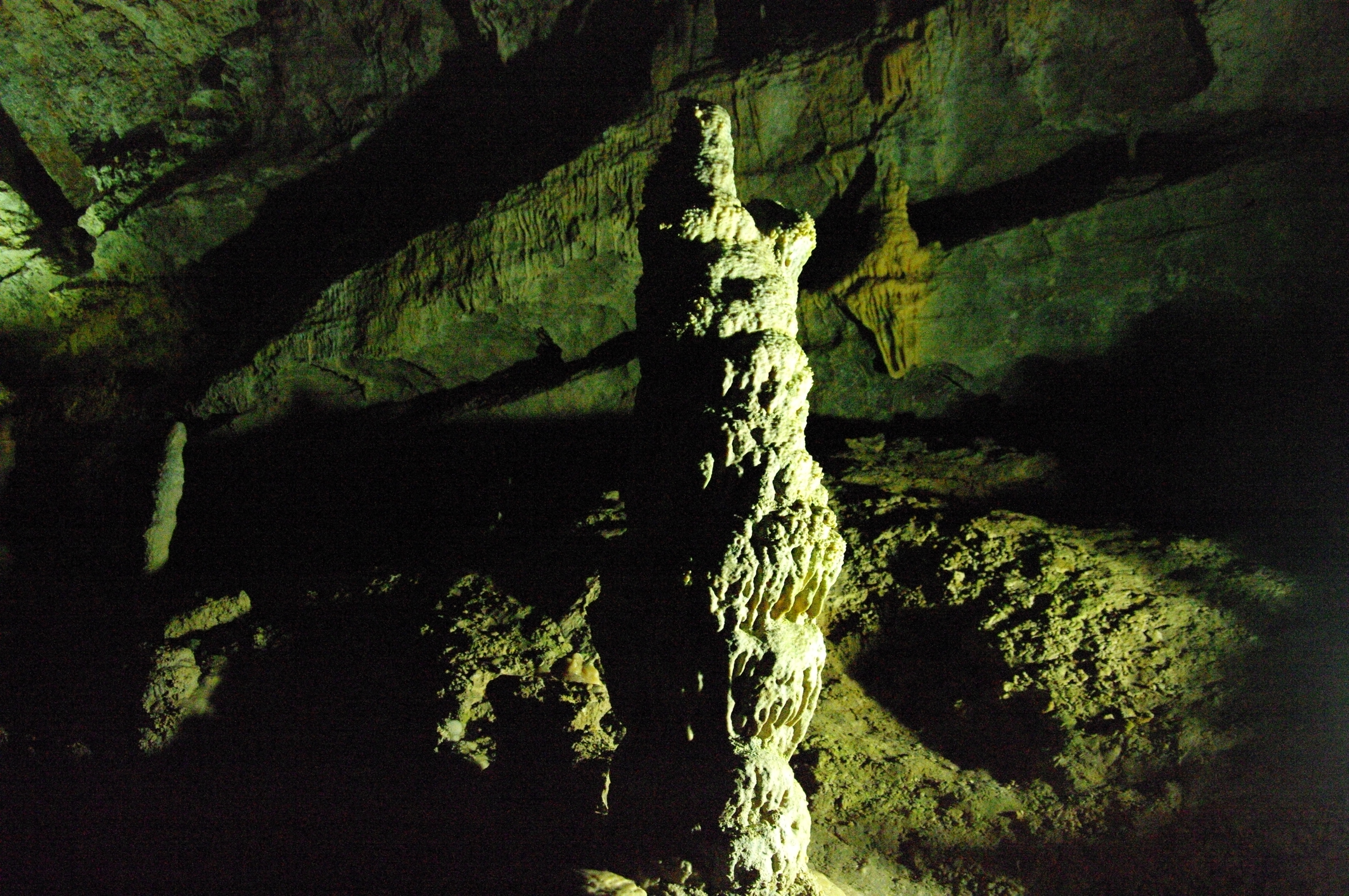 Вікіекспедиція до Абхазії